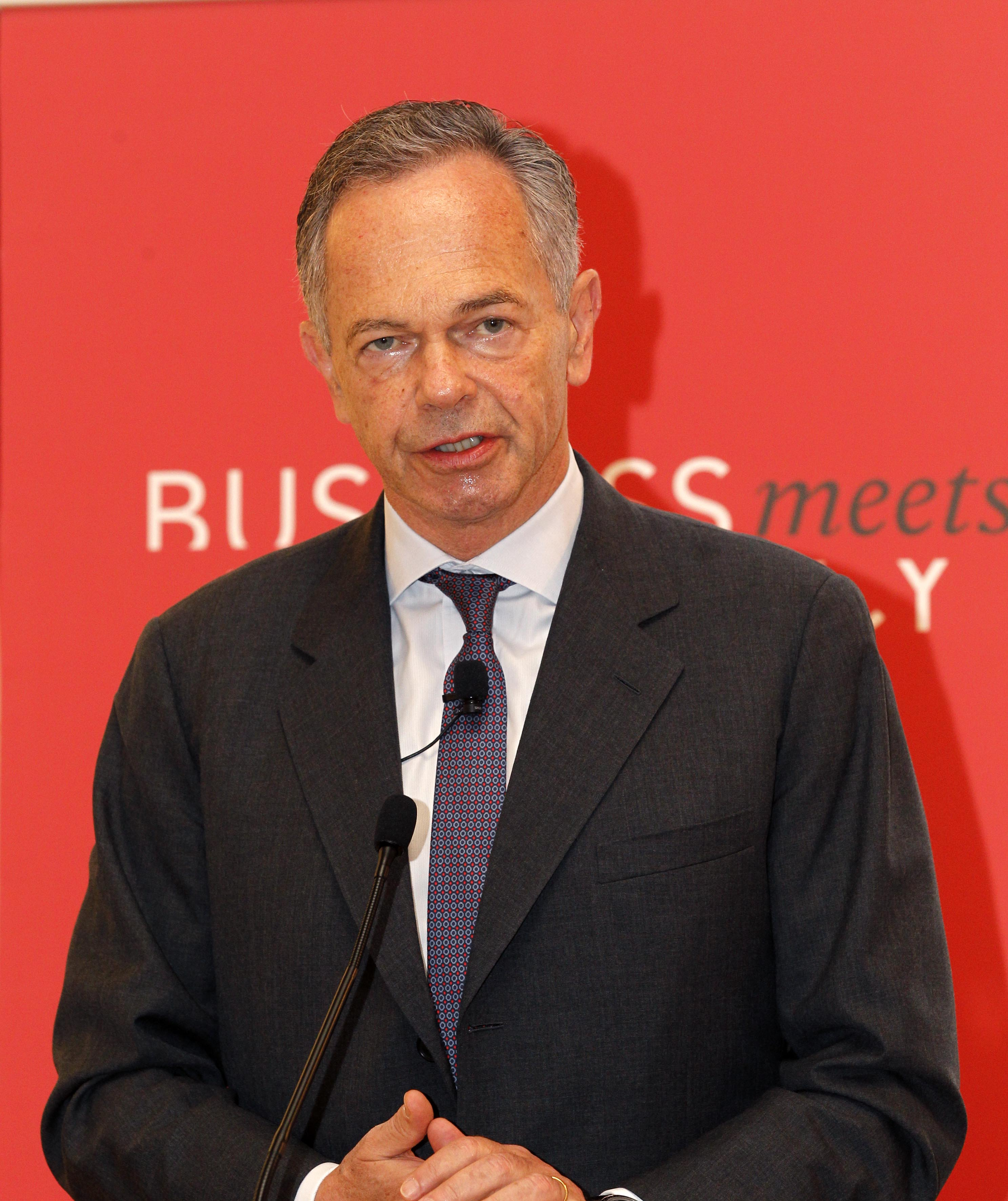 Wien am 10 Juni 2016 Im Rahmen von Business meets Diplomacy treffen prominente VertreterInnen der österreichischen Wirtschaft mit dem ausländischen Diplomatischen Corps zusammen um Einblicke in das heimische Wirtschaftsleben zu erhalten. Generalsekretär Michael Linhart diskutierte heute zusammen mit ERSTE Group Bank Vorstandsvorsitzenden Andreas Treichl über wirtschaftspolitischen Themen und internationale Perspektiven. Foto: Mahmoud